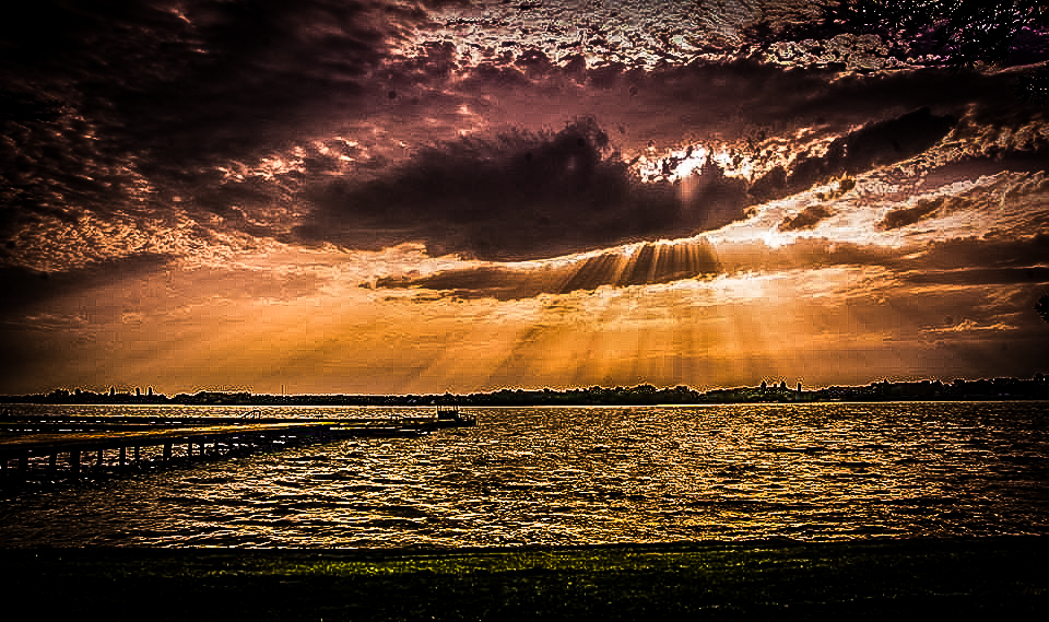 Zalazak Sunca nad prelepim jezerom Palić.Palić je jezero na krajnjem severu Srbije,u SevernoBačkom okrugu,nedaleko od granice s Mađarskom.